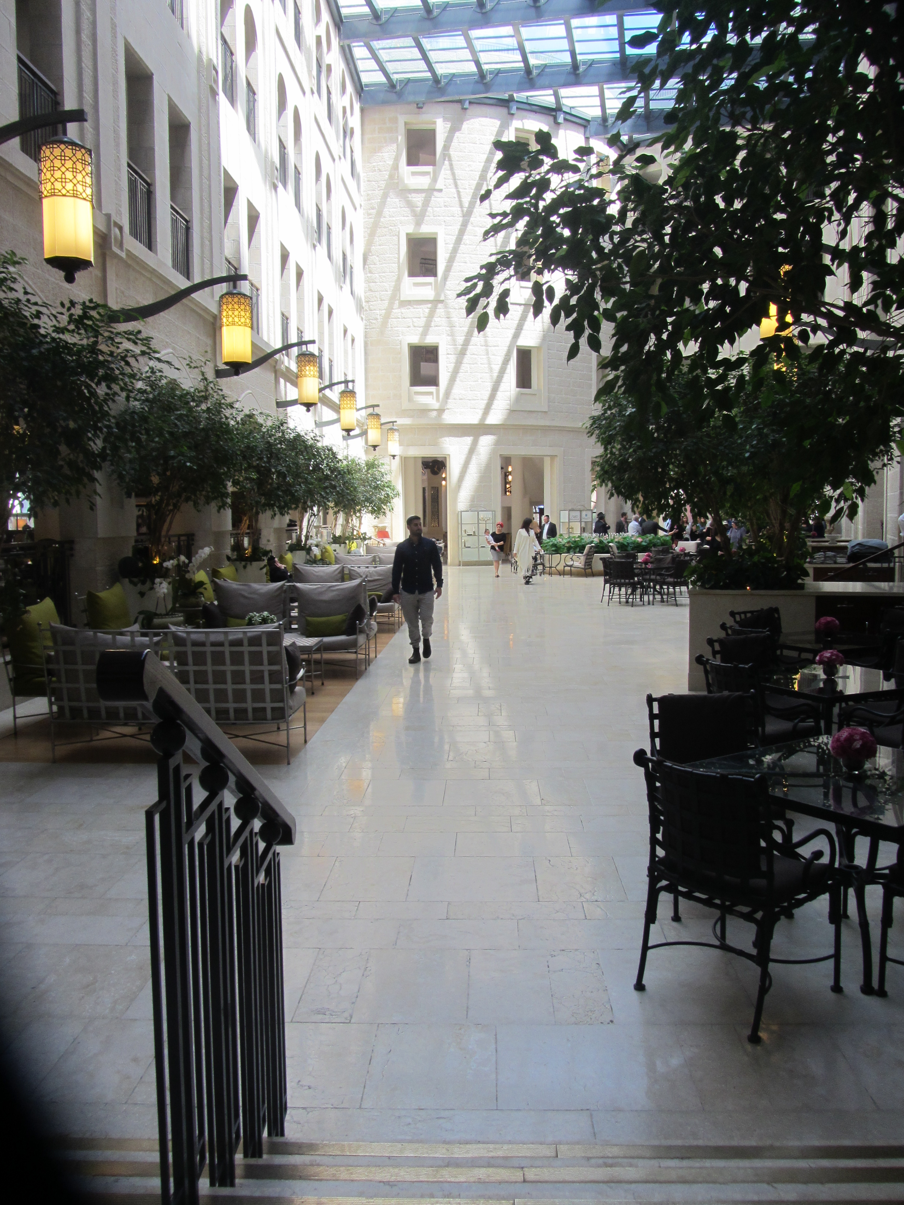 מראה מתוך המלון וולדורף אסטוריה